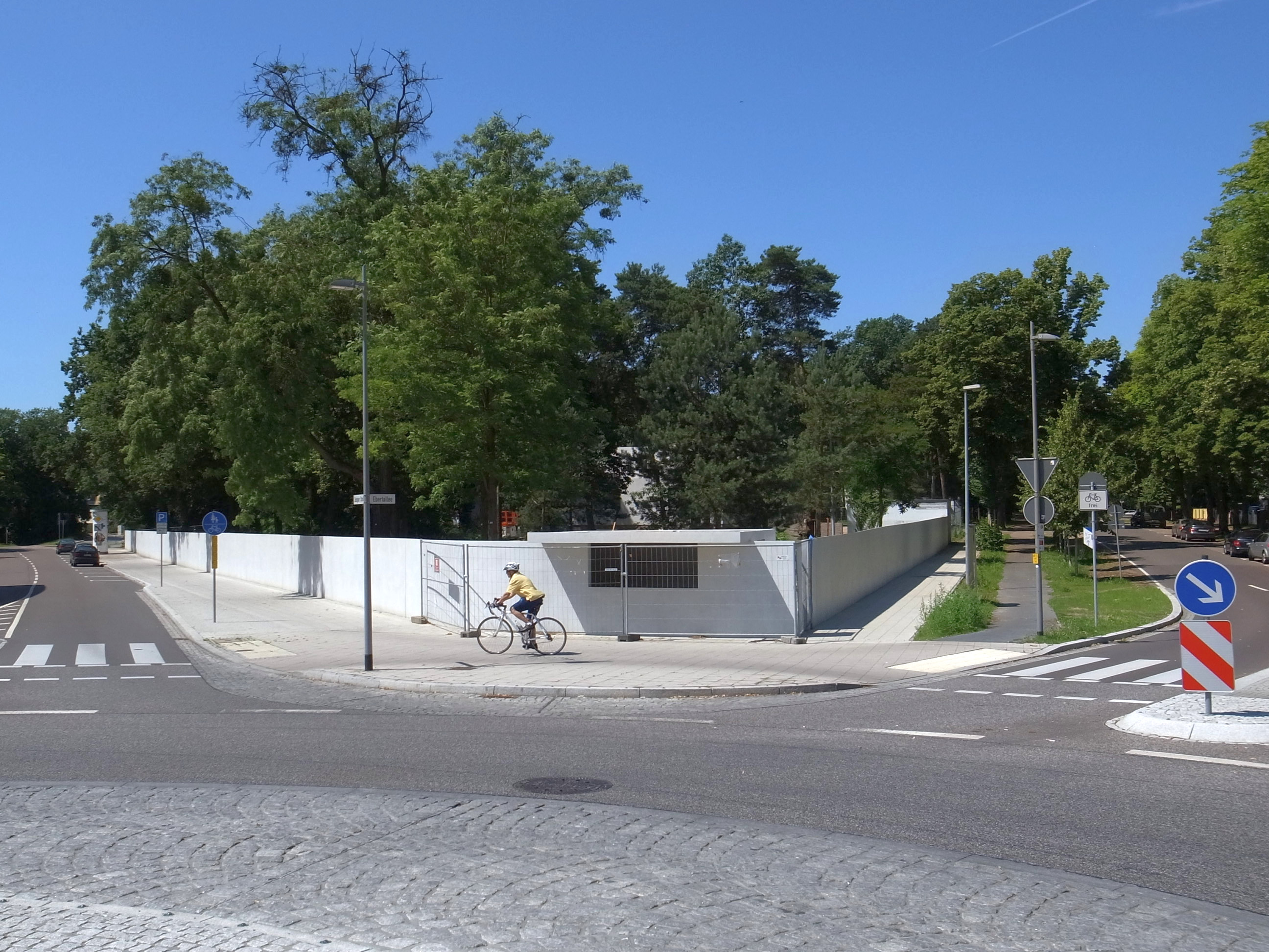 Dessau,Trinkhalle von Ludwig Mies van der Rohe. 2012/2013 Wiederaufbau im Rahmen der städtebaulichen Reparatur der Meisterhaussiedlung